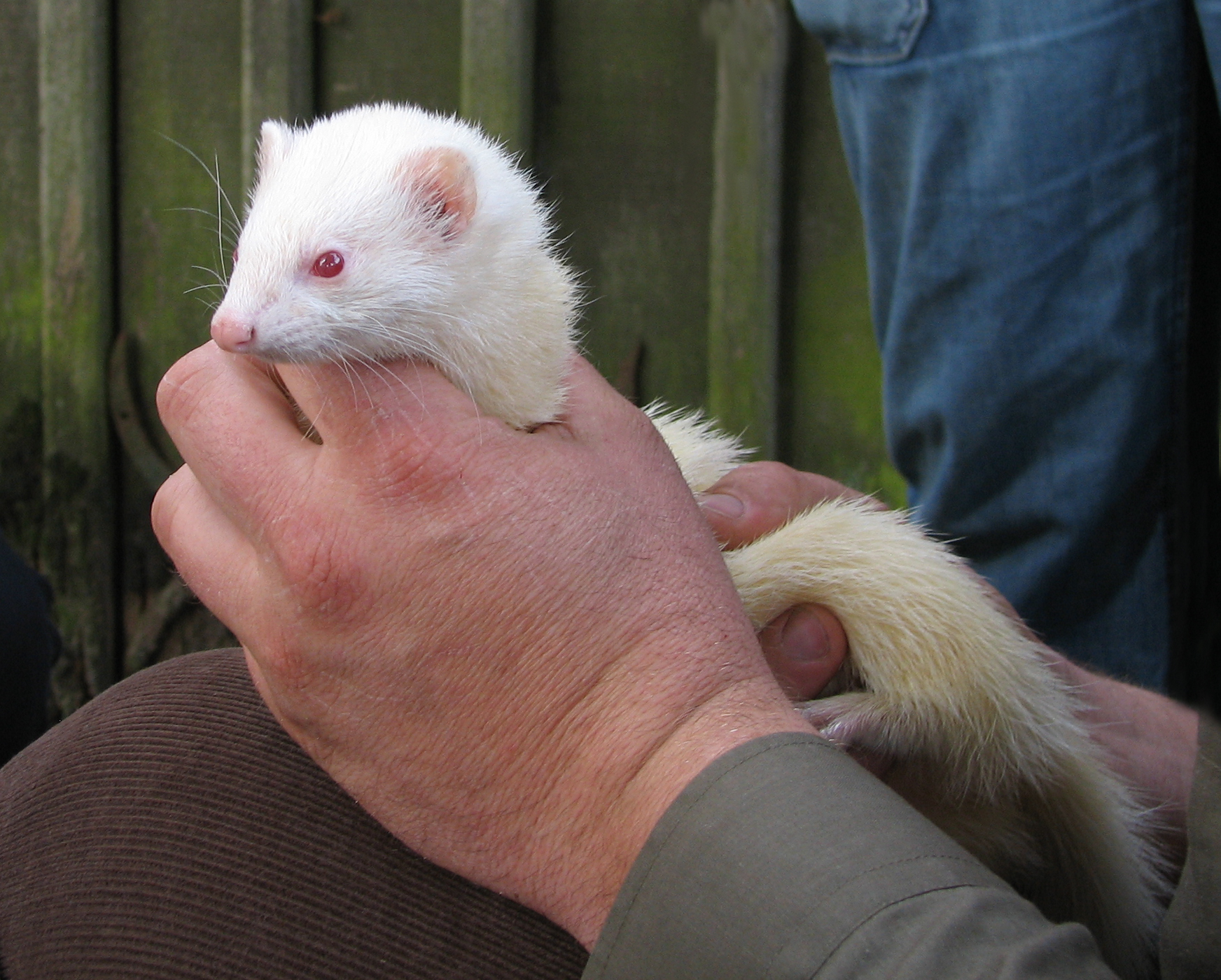 Jagd-Frettchen in der Hand eines Jägers (vermutlich in Deutschland)